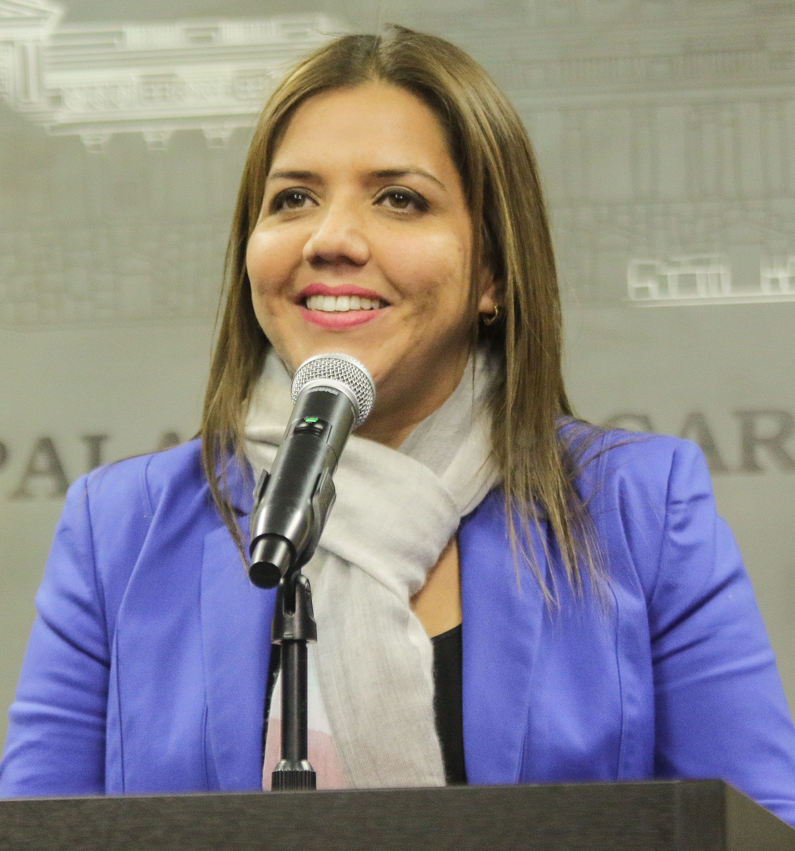 Quito 4 Oct (ANDES).- Maria Alejandra Vicuña asume funciones vicepresidenciales bajo mandato ejecutivo. Fotografías: Carlos Rodríguez/Andes.